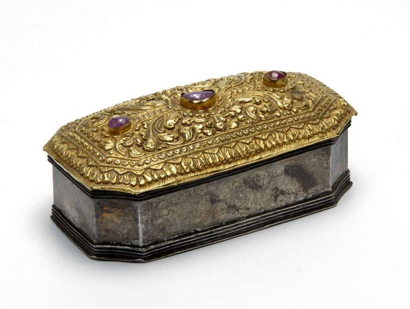 Sirihdoos. Een sierdoosje gebruikt voor sirih ingrediënten. Het doosje is versierd met lotus motieven en drie stenen, waarschijnlijk robijnen.. Zilveren sirihdoos met gouden dekselbekleding